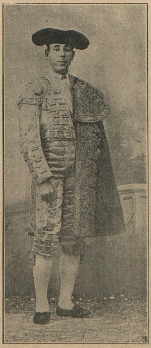 Antonio Montes, La Fiesta Nacional (Barcelona), 9 de julio de 1904. Biblioteca Nacional de España